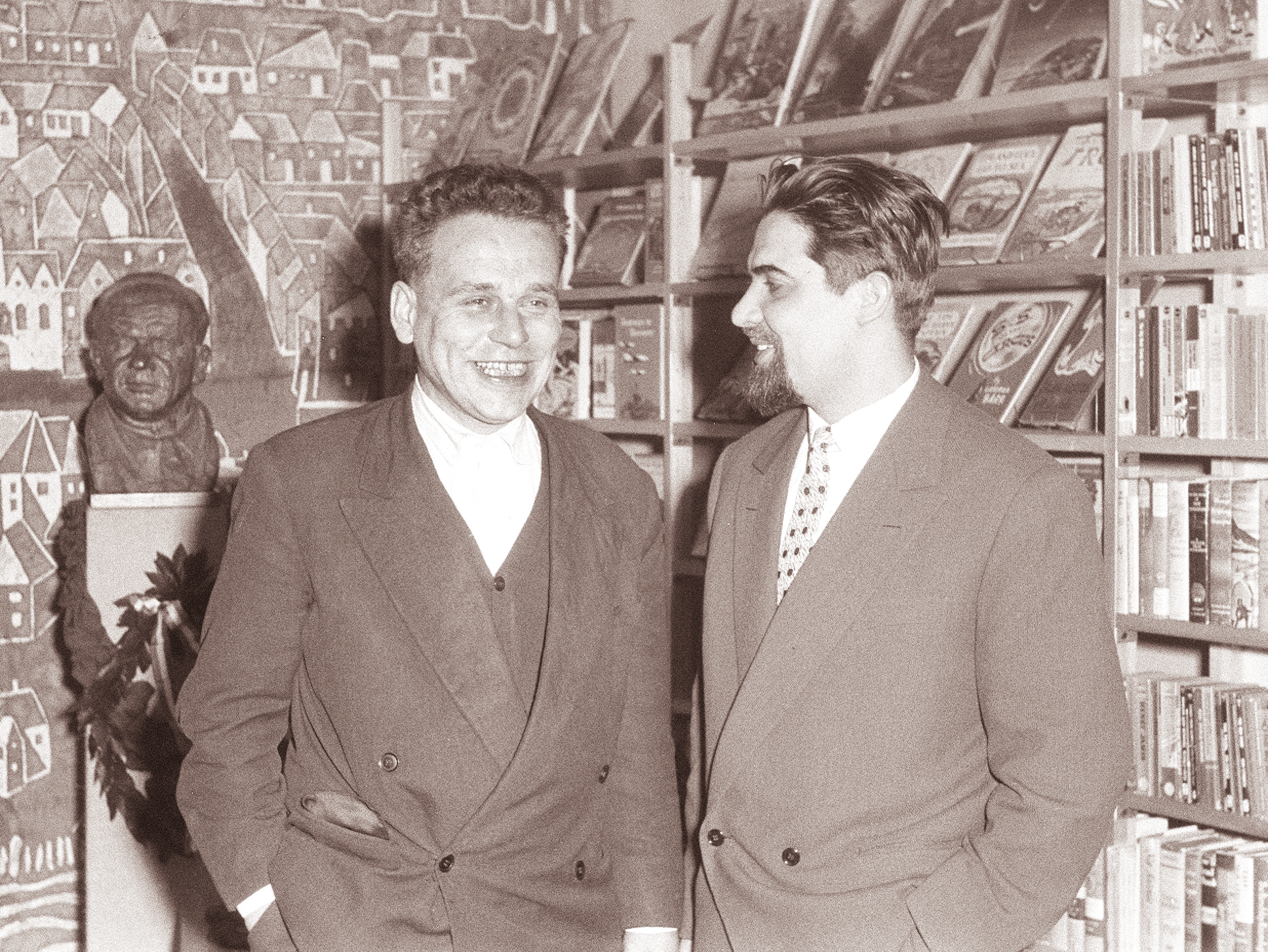 Dominik Smole and Ciril Zlobec